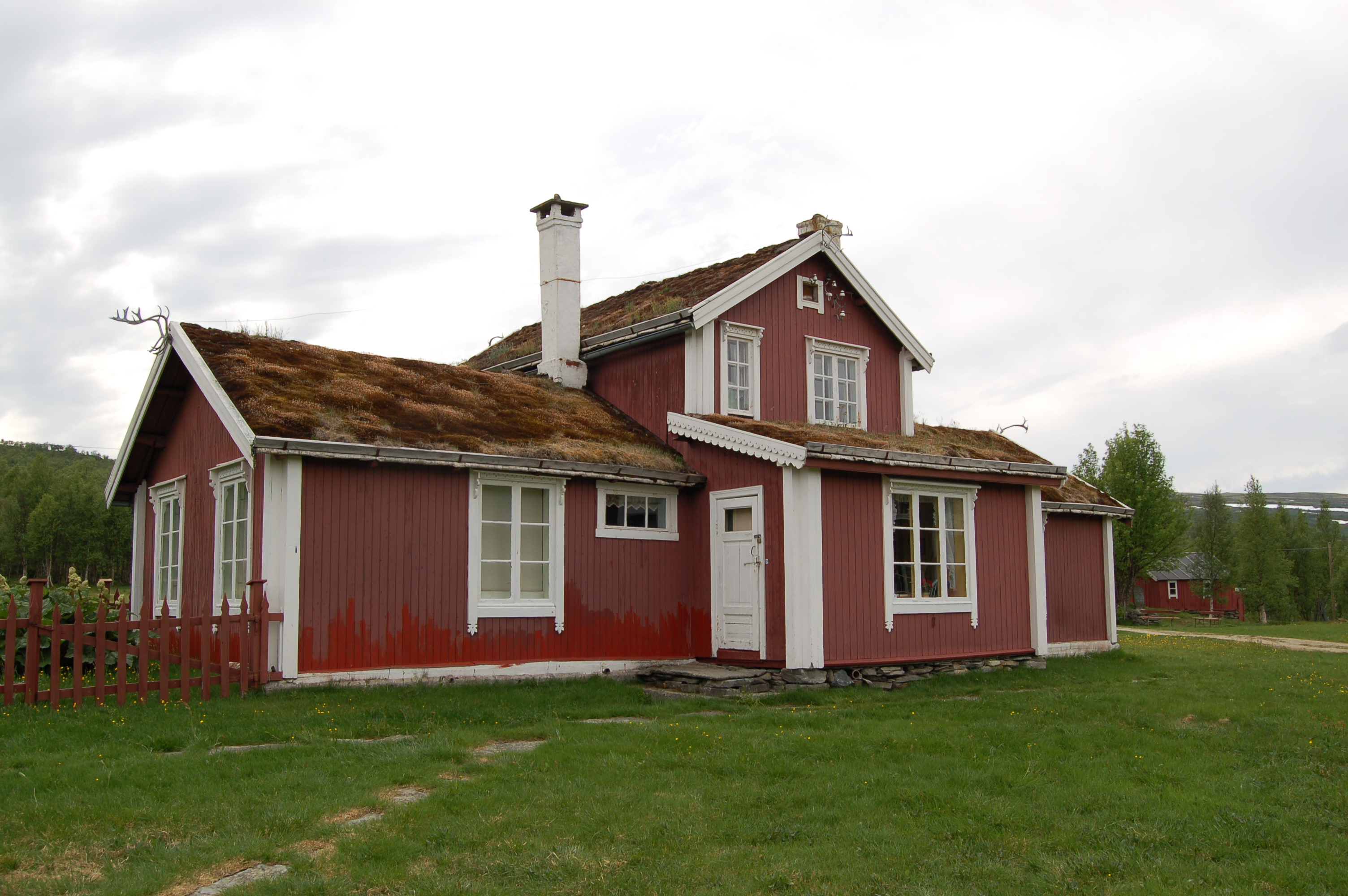 Ratvolden i Rugeldalen - Falkbergets fødested.